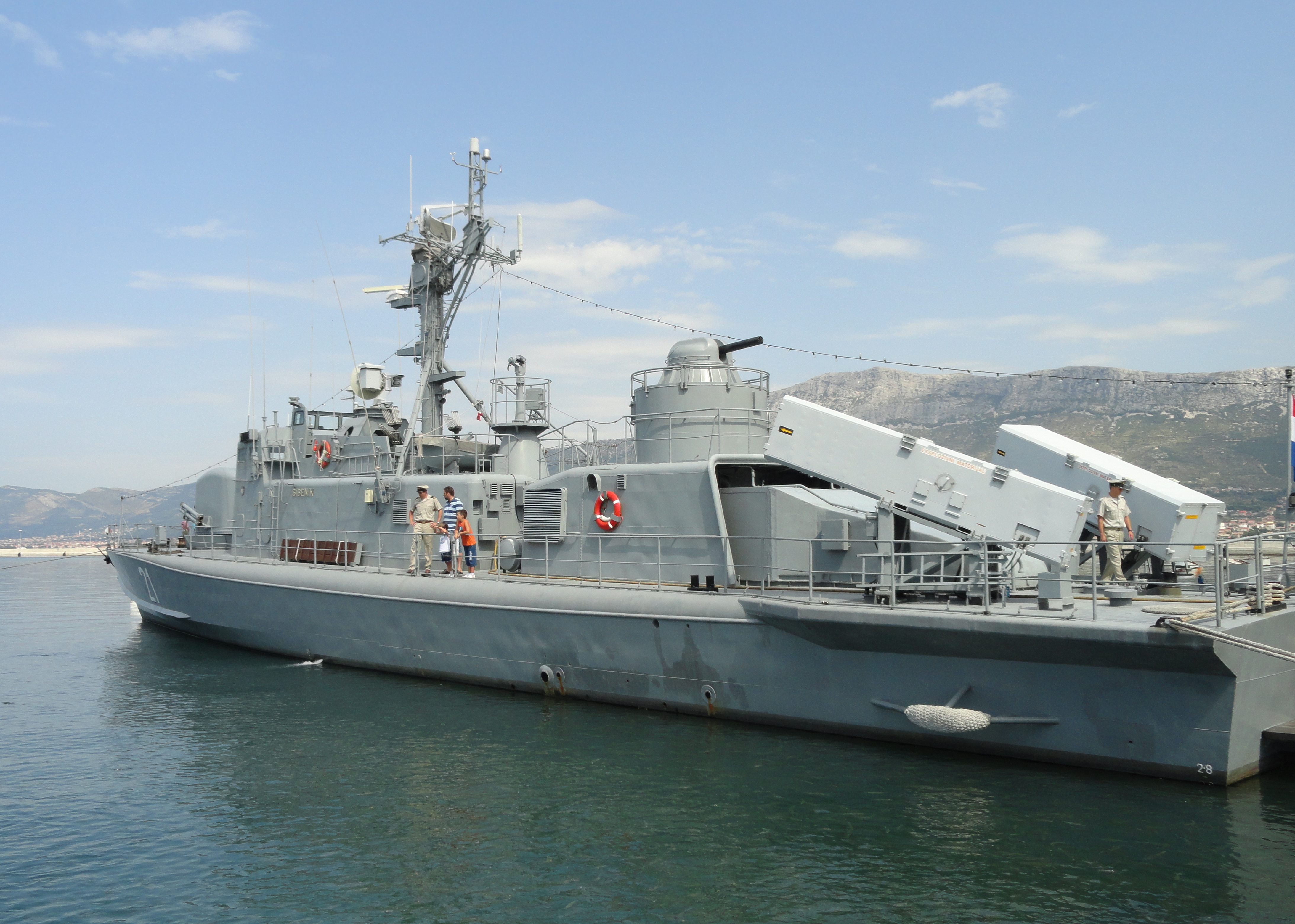 RTOP-21 Šibenik u Lori.